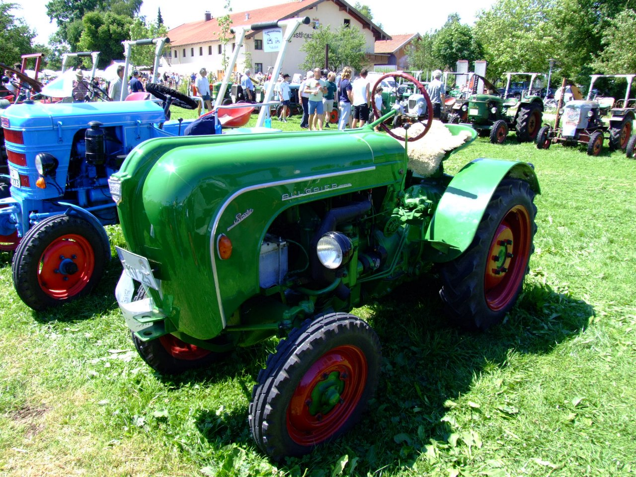 Allgaier Porsche AP22 mit 22 PS, Baujahr 1956